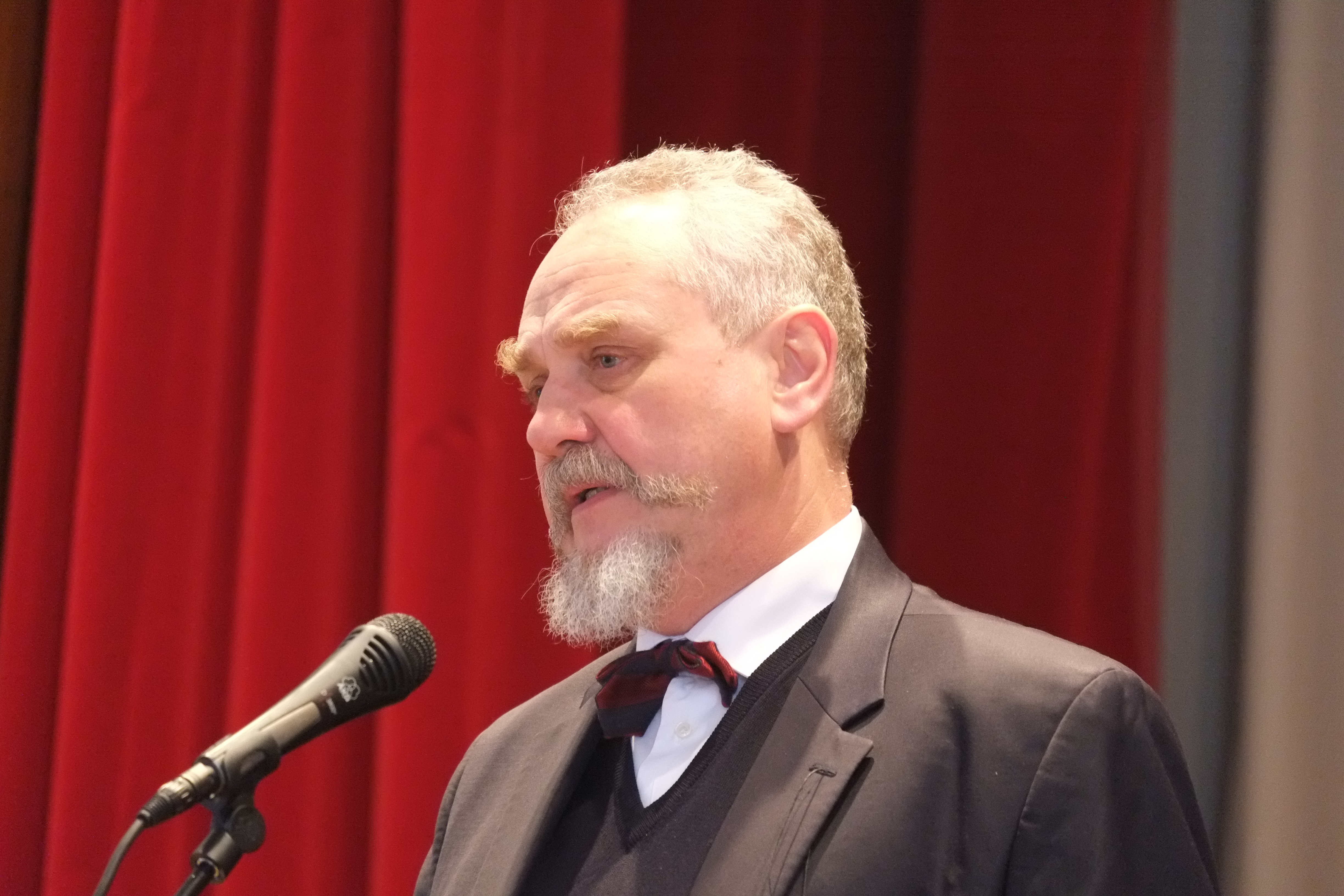 Профессор Андрей Зубов на антивоенном конгрессе